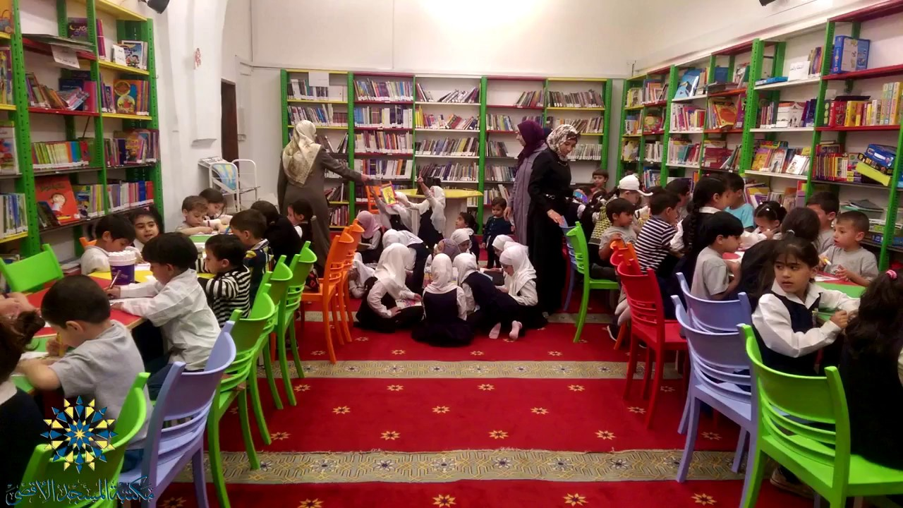 ספריית הילדים מסגד אל-אקצא